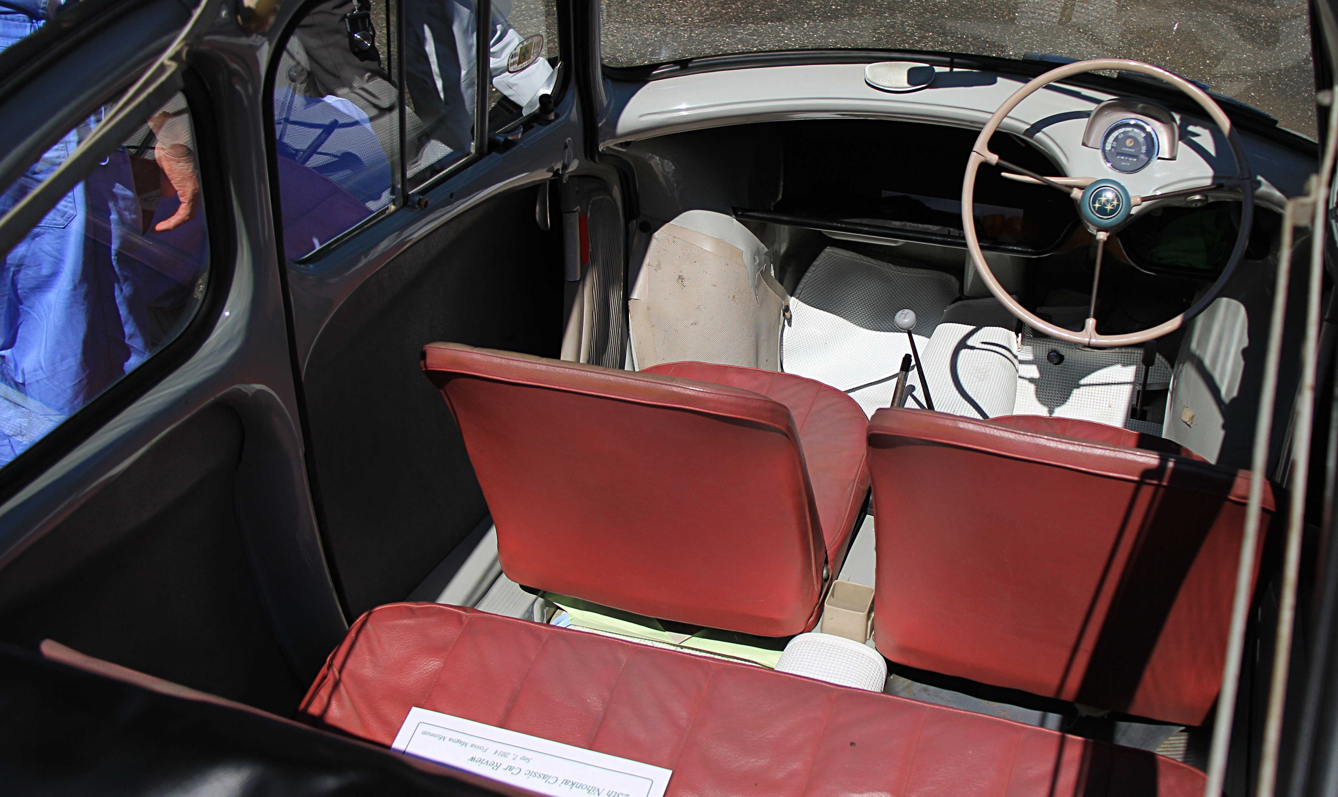 Subaru 360